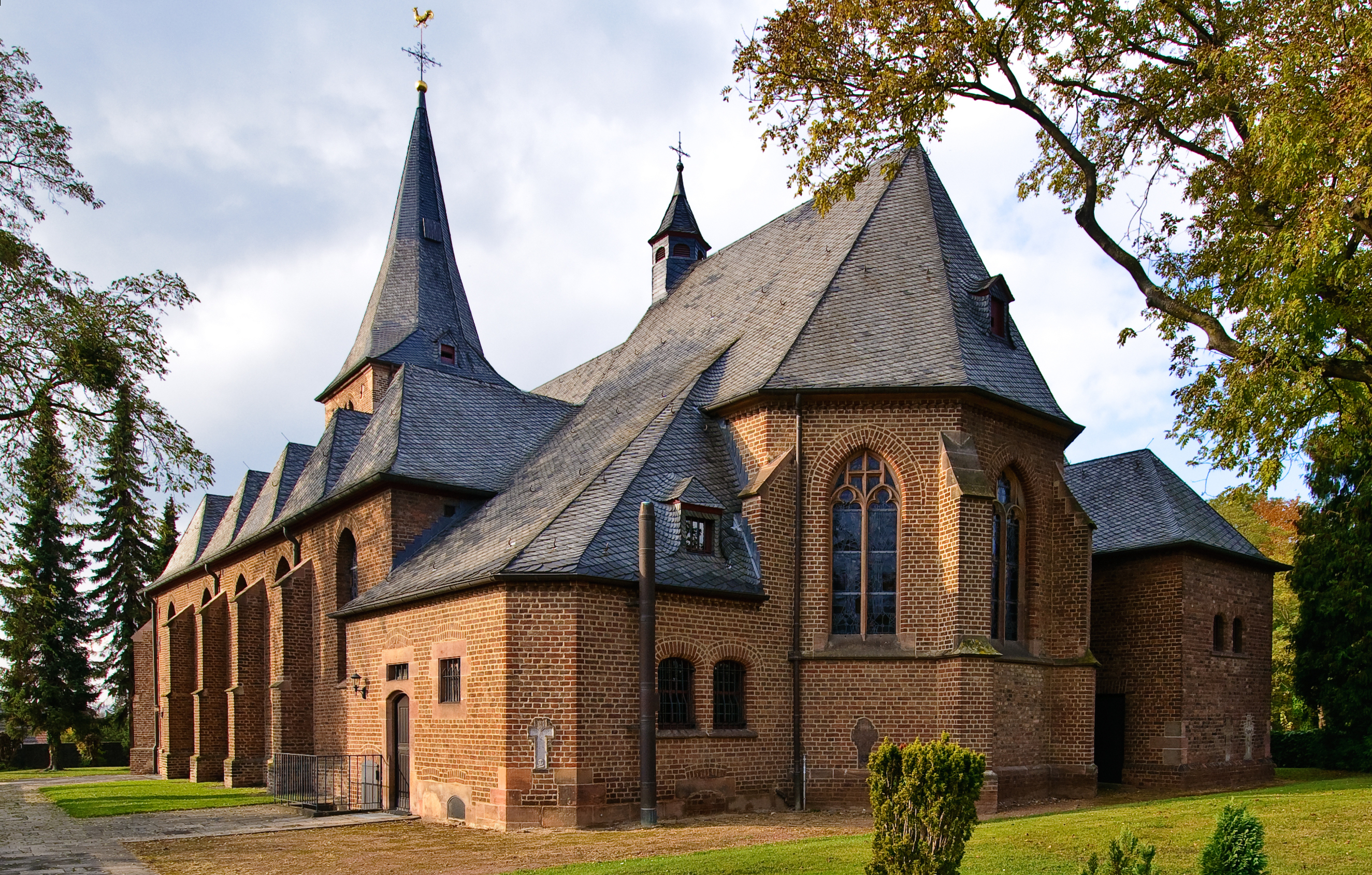 Kirche St. Laurentius in Quadrath-Ichendorf. Ortsteil von Bergheim im Rhein-Erftkreis